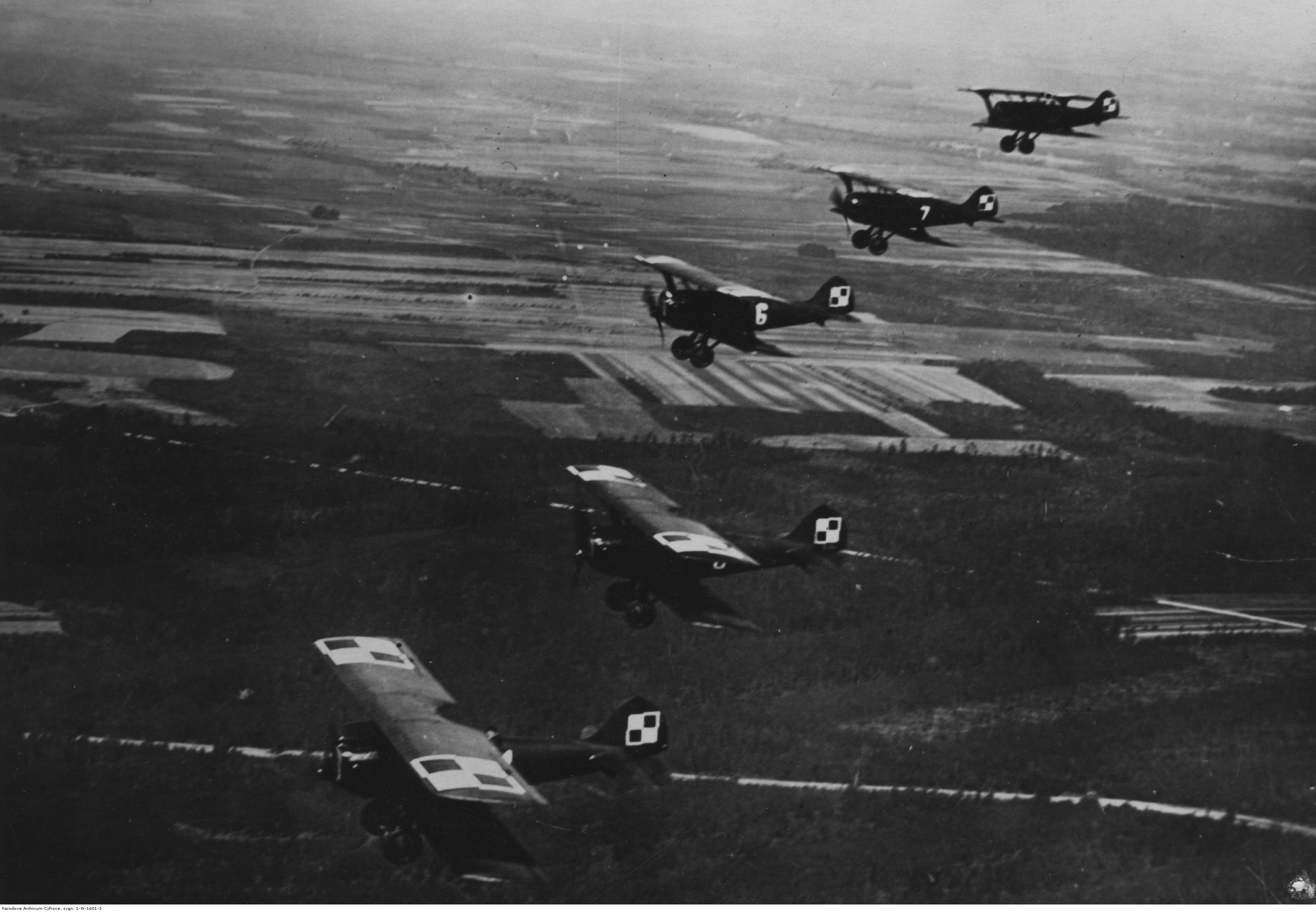 Samoloty myśliwskie Bleriot SPAD 61 C1 w locie. Koncern Ilustrowany Kurier Codzienny - Archiwum Ilustracji. Sygnatura: 1-W-1601-3